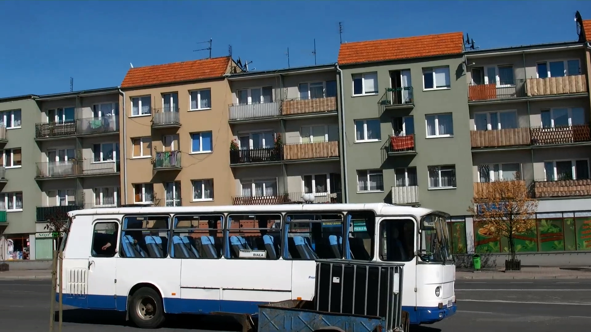 Darek Kraśnicki - Biała Prudnicka